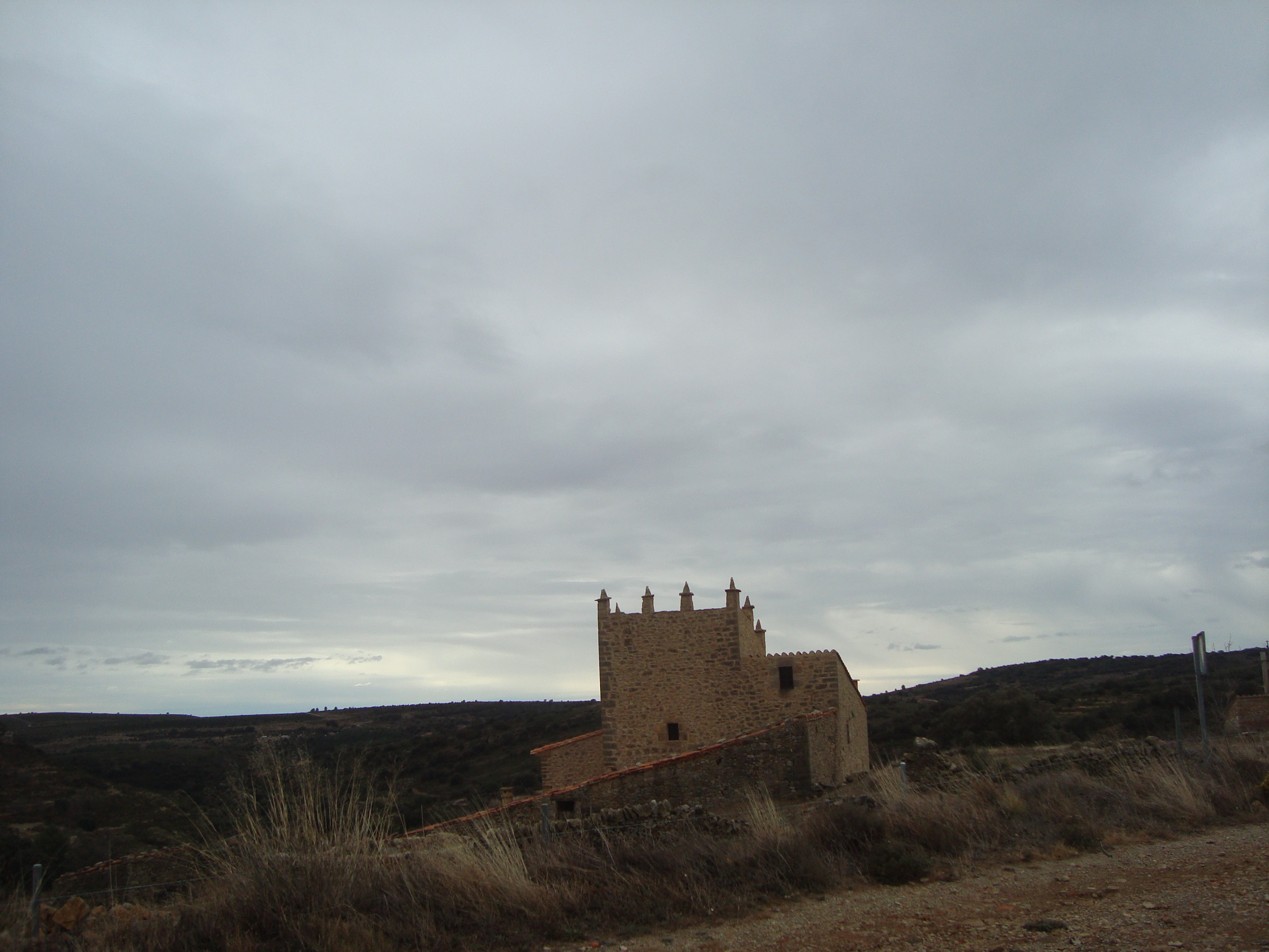 Torre Amador, Culla (Alt Maestrat, Castellón)